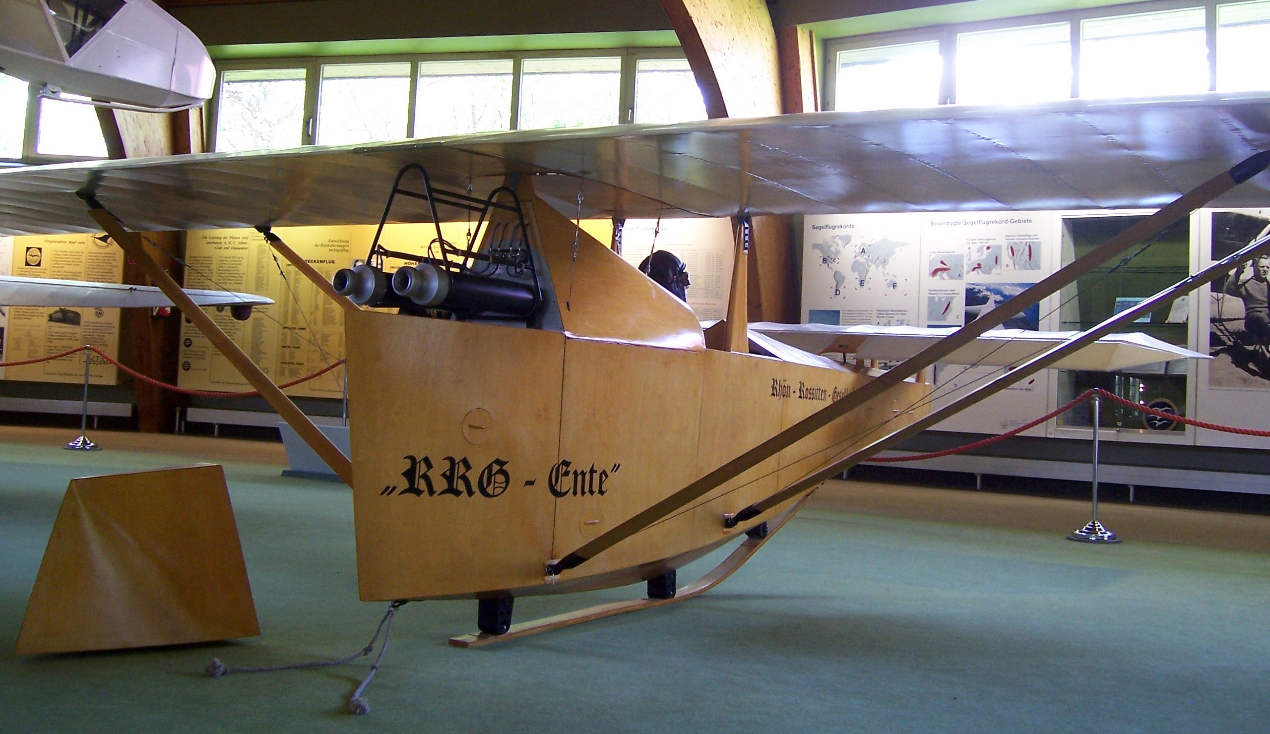 RRG Raketen-Ente: Heckansicht mit 2 Feststoffraketen